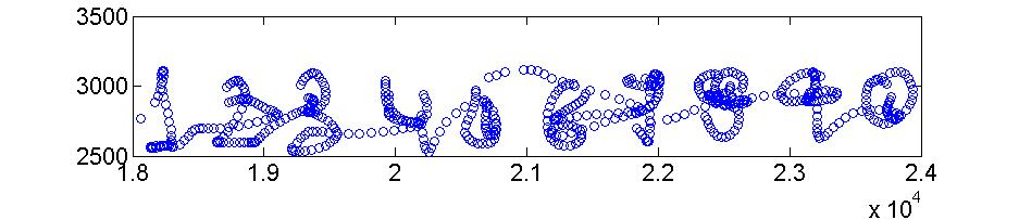 Numeros adquiridos con intuos WACOM y MATLAB